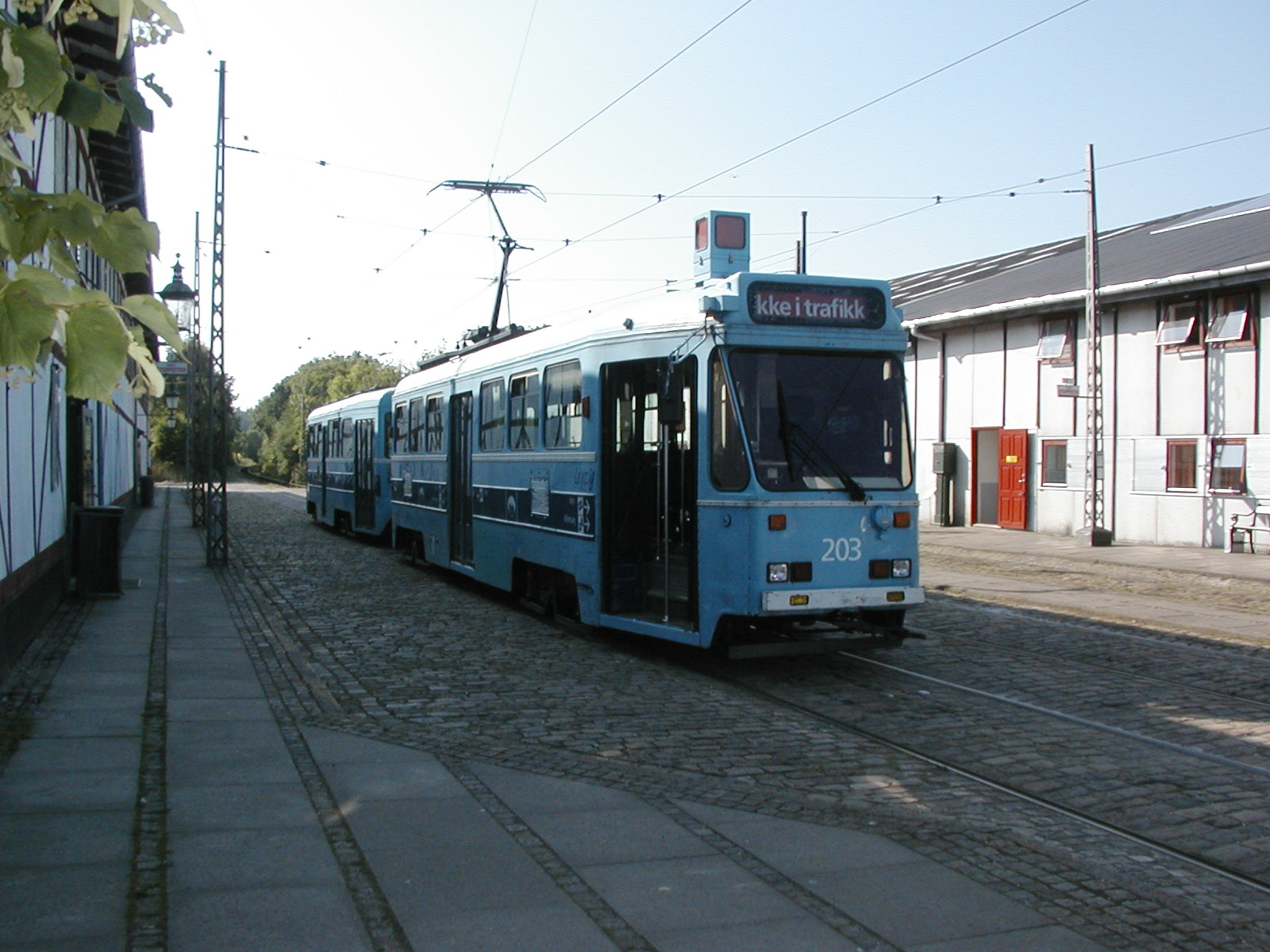 SM-83 203 på sporvejsmuseet Skjoldenæsholm